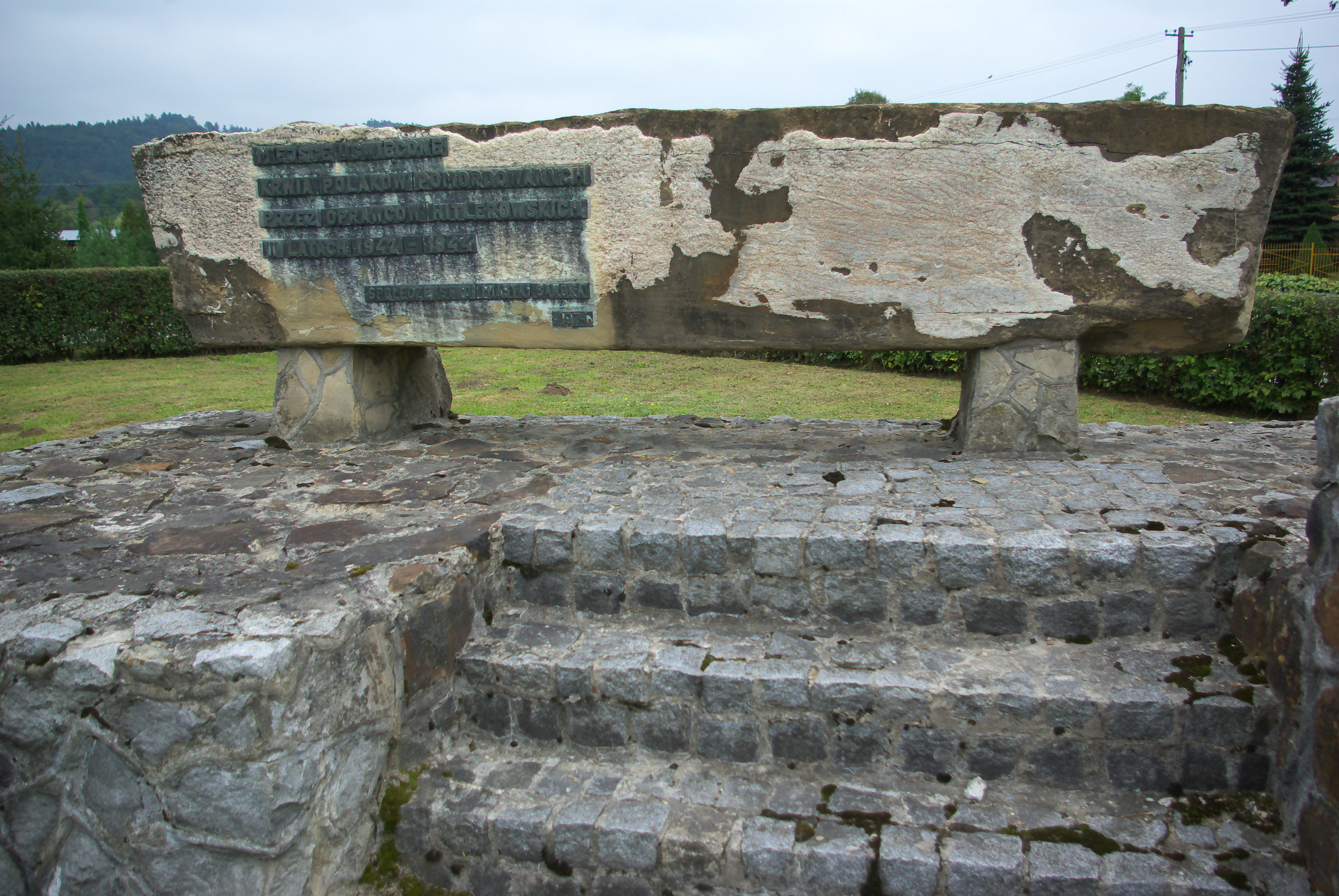 Pomnik „Miejsce uświęcone krwią Polaków pomordowanych przez oprawców hitlerowskich w latach 1942 – 1944”. Społeczeństwo miasta Sanoka 1974